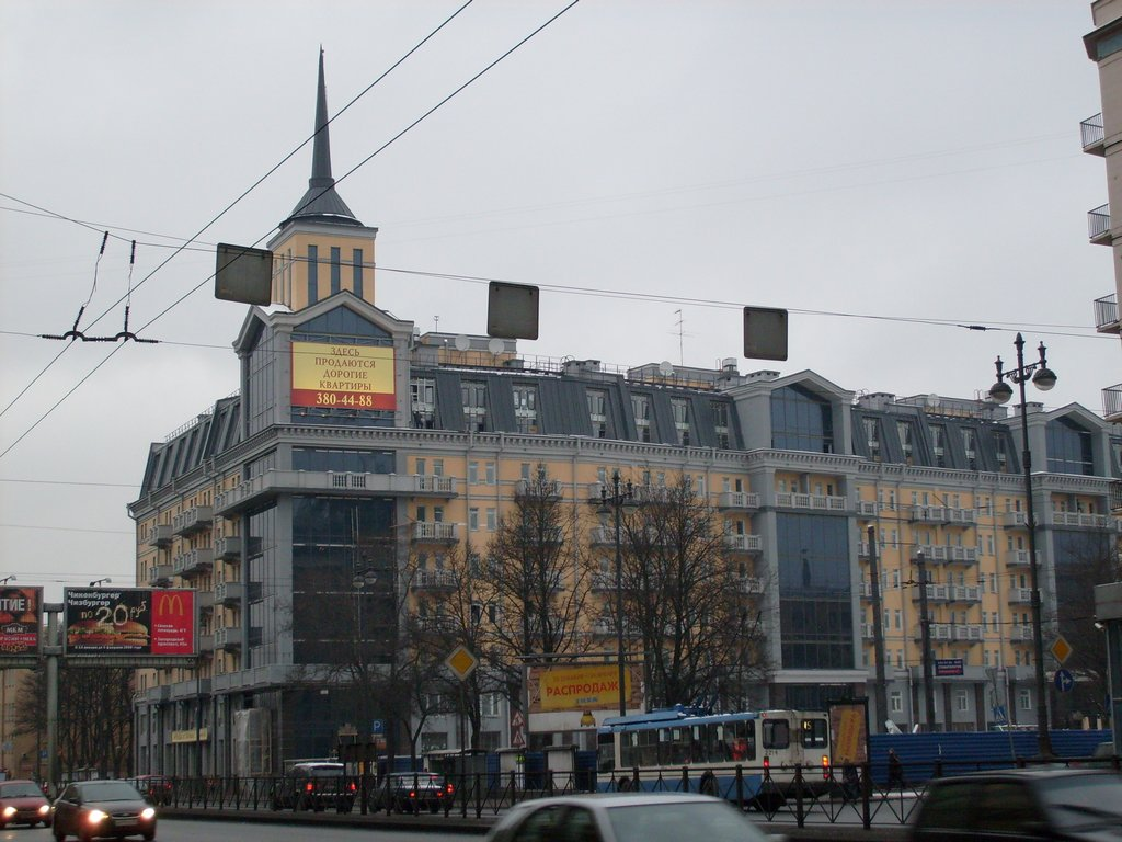 Пример современной архитектуры на Московском проспекте в Петербурге